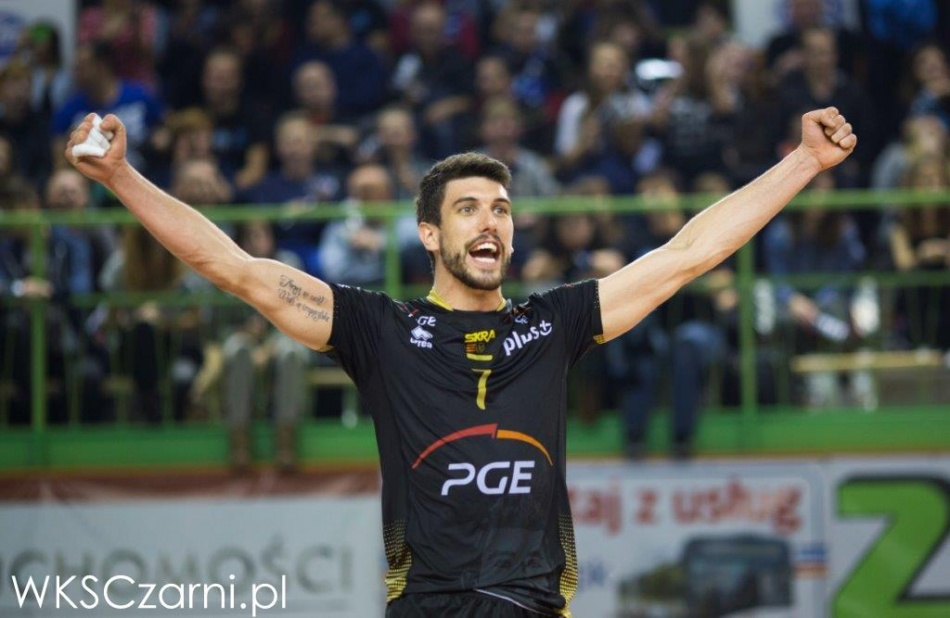 Facundo Conte - argentyński siatkarz, przyjmujący. Sezon 2014/15